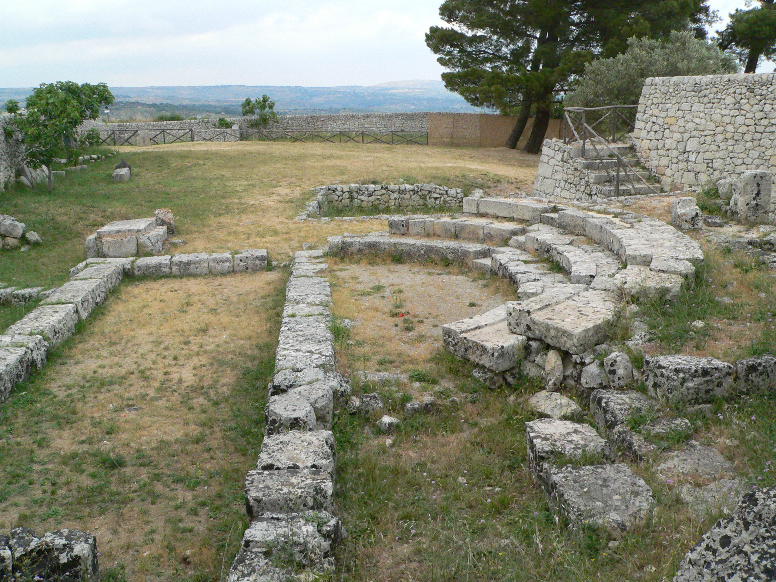 Bouleuterion Akrai Sicilia M. Disdero 9 Juin 2006B